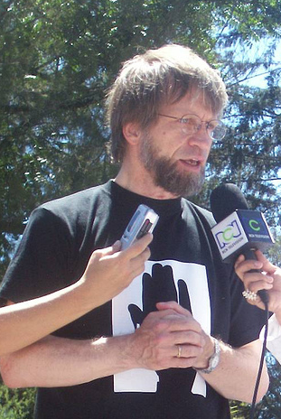 Antanas Mockus by Julián Ortega Martínez / equinoXio (cropped version)